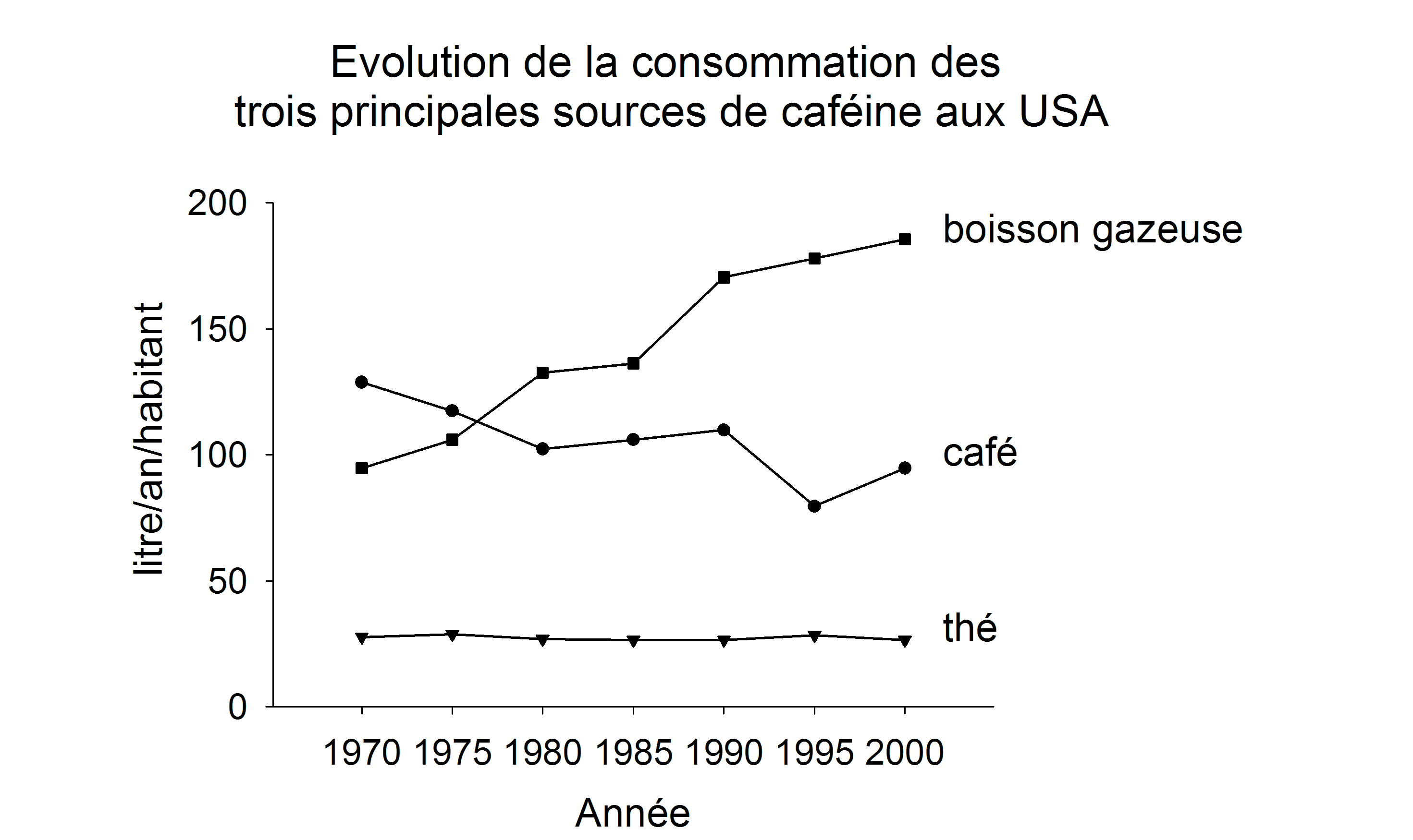 Evolution de la consommation des trois principales sources de caféine aux États-Unis, d'après "Substance Abuse, A comprehensive textbook", JH Lowinson ed., Lippincott, Williams & Wilkins editions, New York.